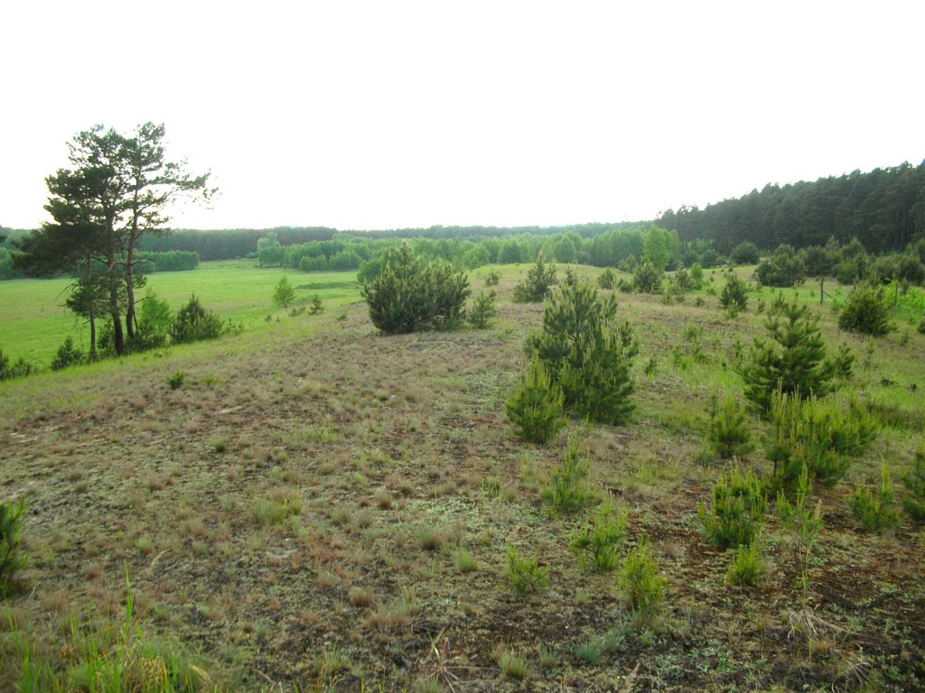 Puszcza Bydgoska